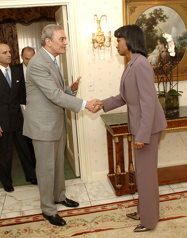 Saud Al Faysal and Condoleezza Rice.